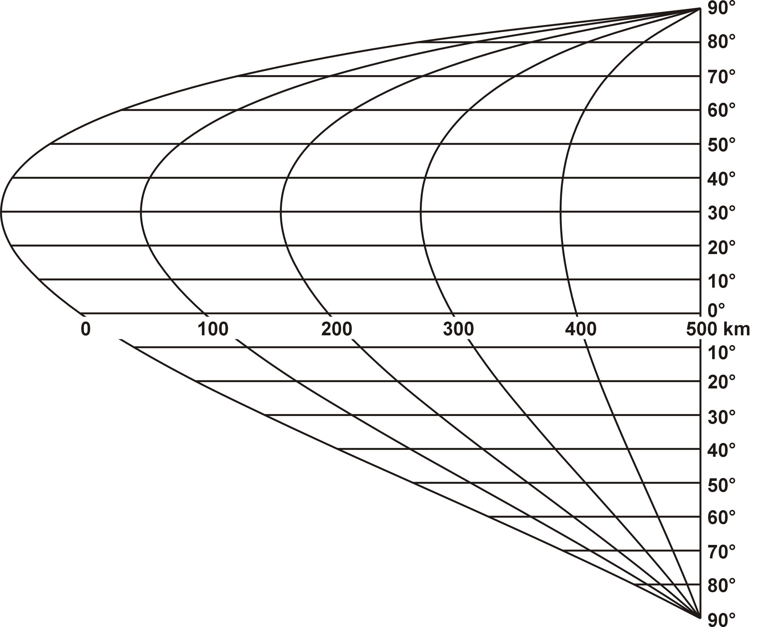 Podziałka złożona dla mapy świata w odwzorowaniu stożkowym Ptolemeusza z południkiem styczności 30°N. Autor Aotearoa